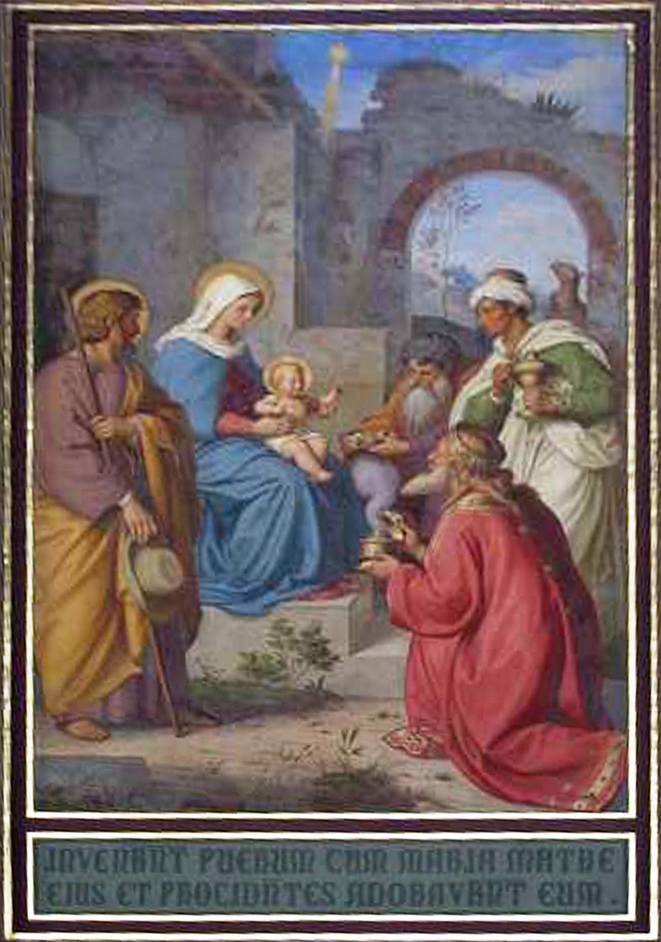 Speyerer Dom, Fresko im Langschiff